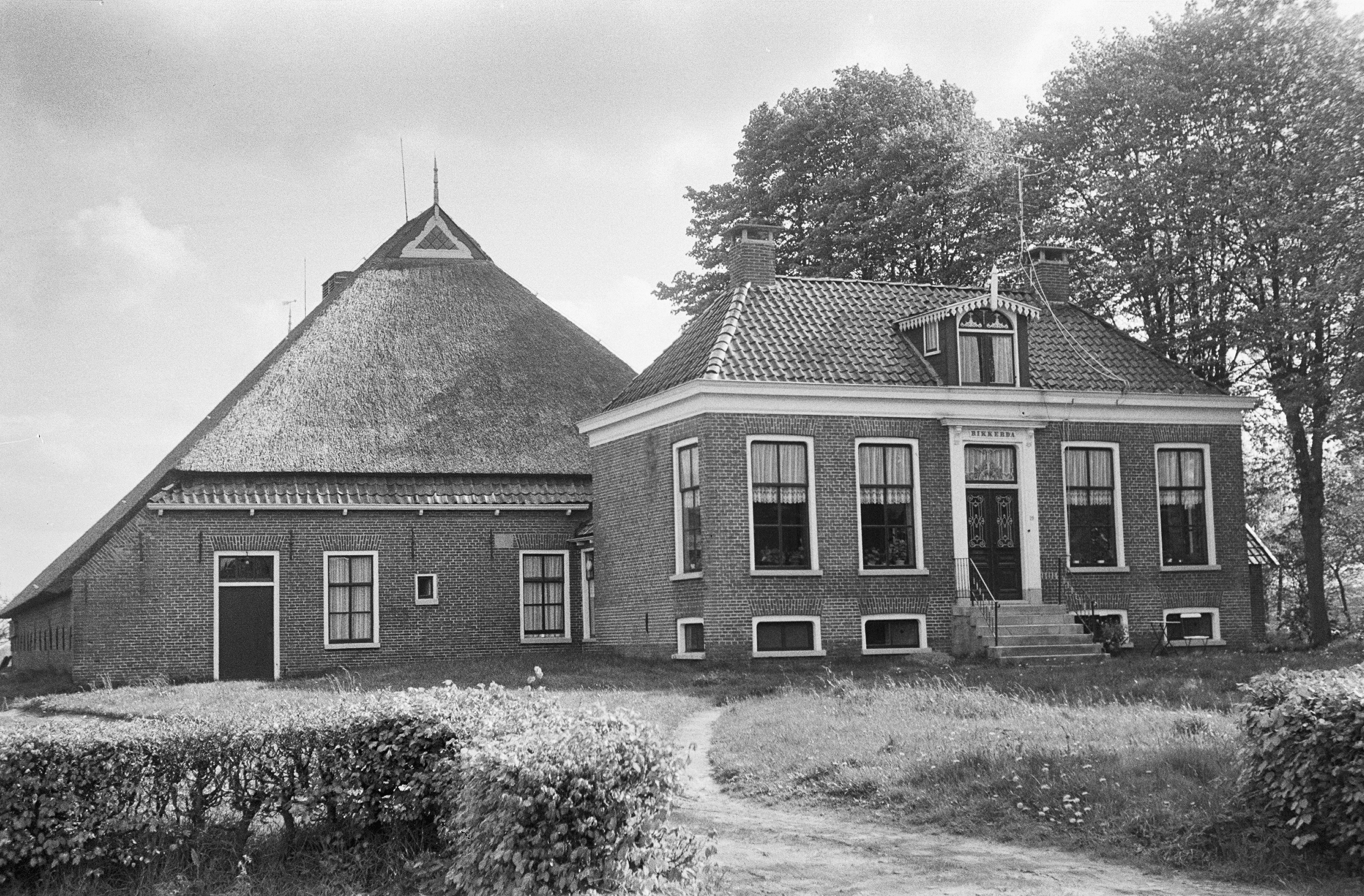 Rikkerda - Boerderij: aanzicht